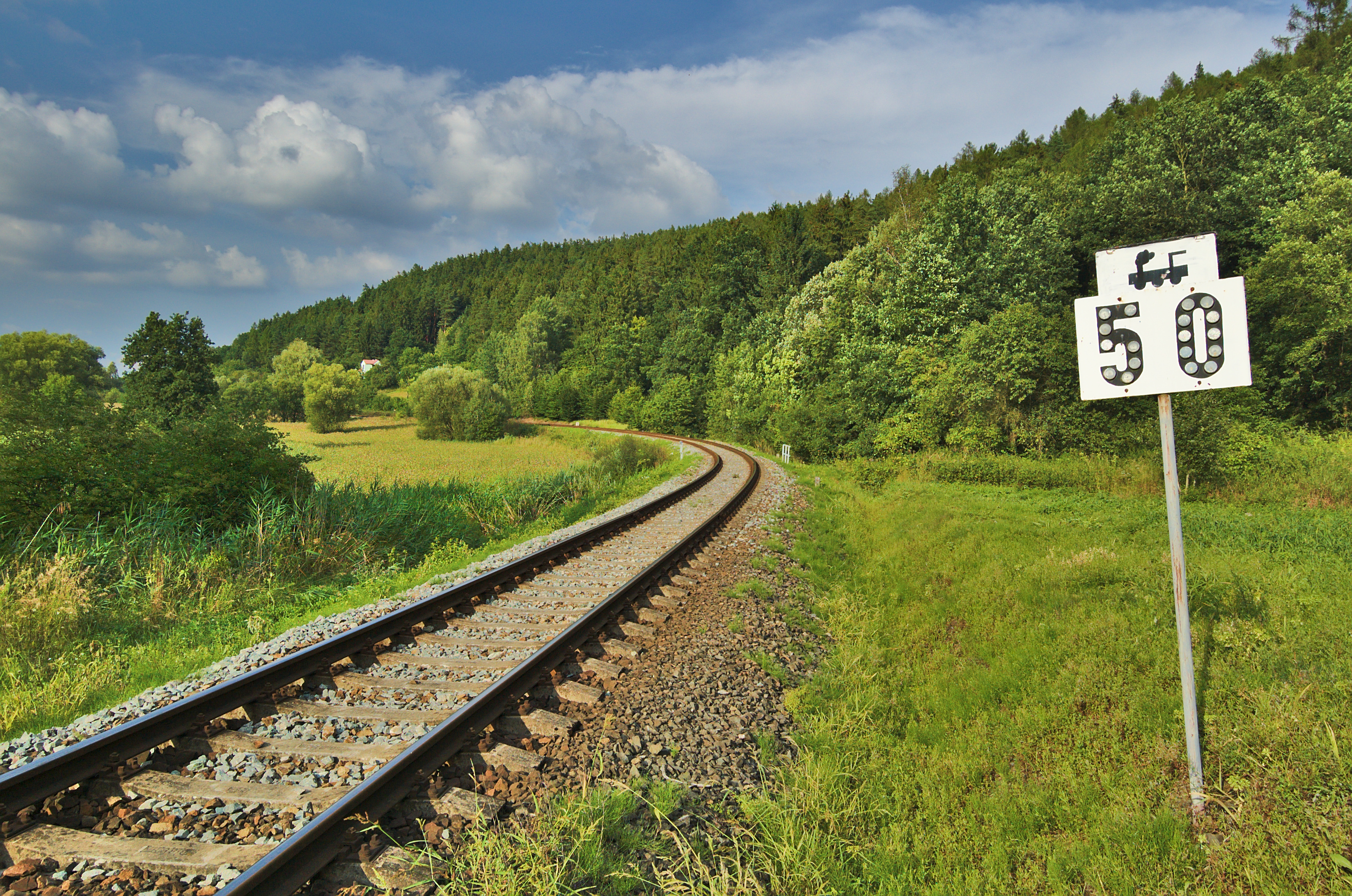 Železniční trať 262 mezi stanicemi Boskovice a Knínice blízko Sudického dvora, okres Blansko